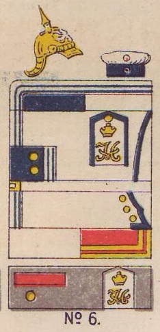 Schematische Farbdarstellung der Uniform des Kürassier-Regiment (Brandenburgisches) Nr. 6